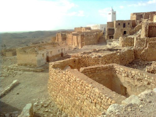 Zrawa photo